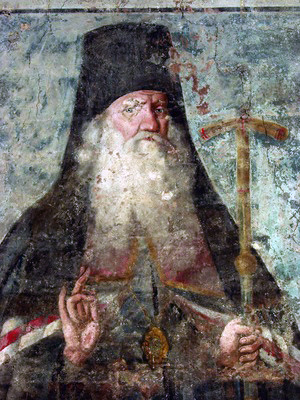 Гавриил (Русской), архиеп. Великоустюжский. Роспись юж. стены Успенского собора в Вел. Устюге.